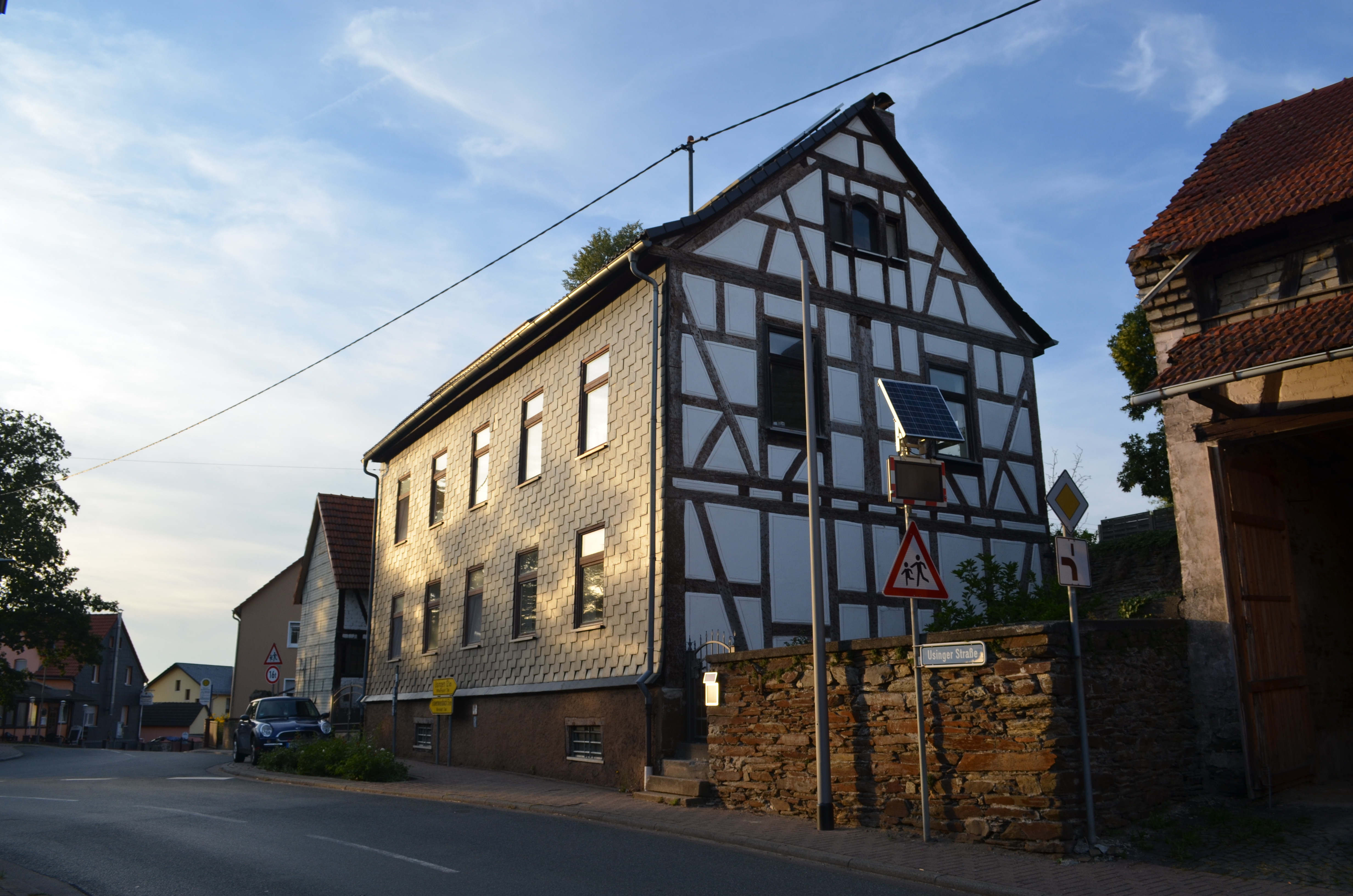 Heinzenberg, Usinger Straße 1